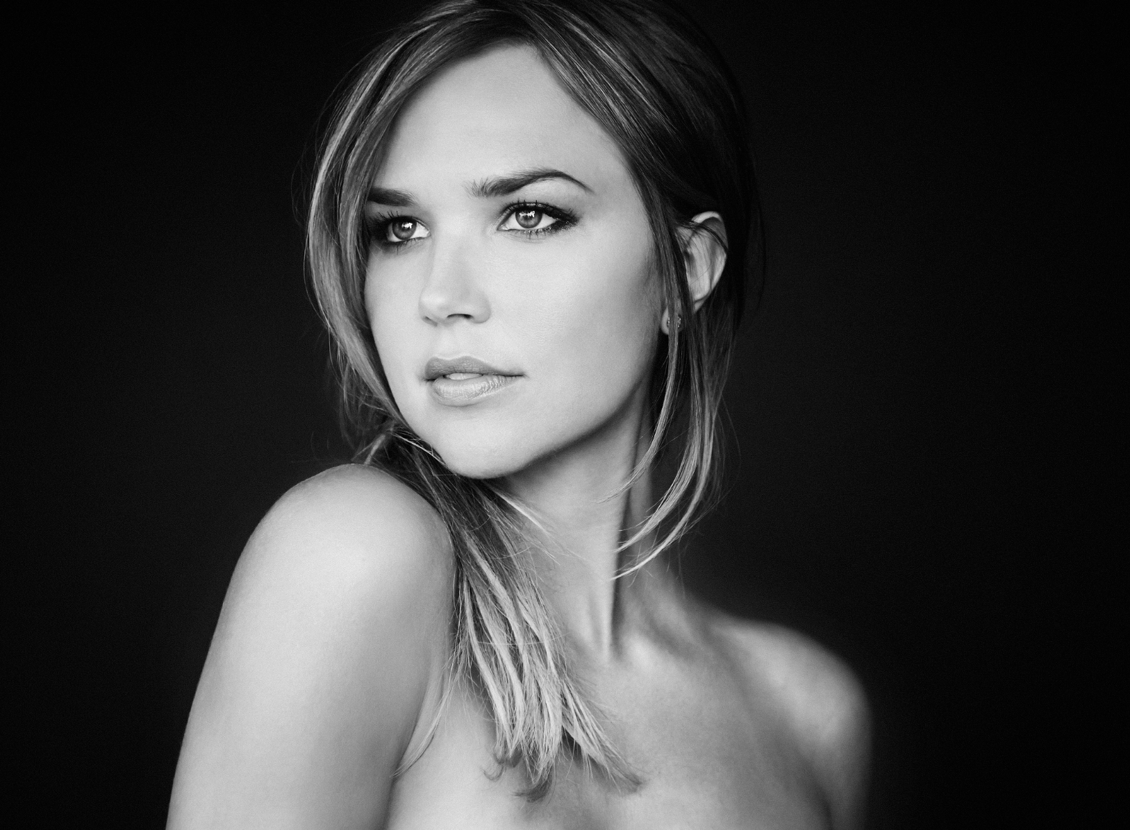 Arielle Kebbel